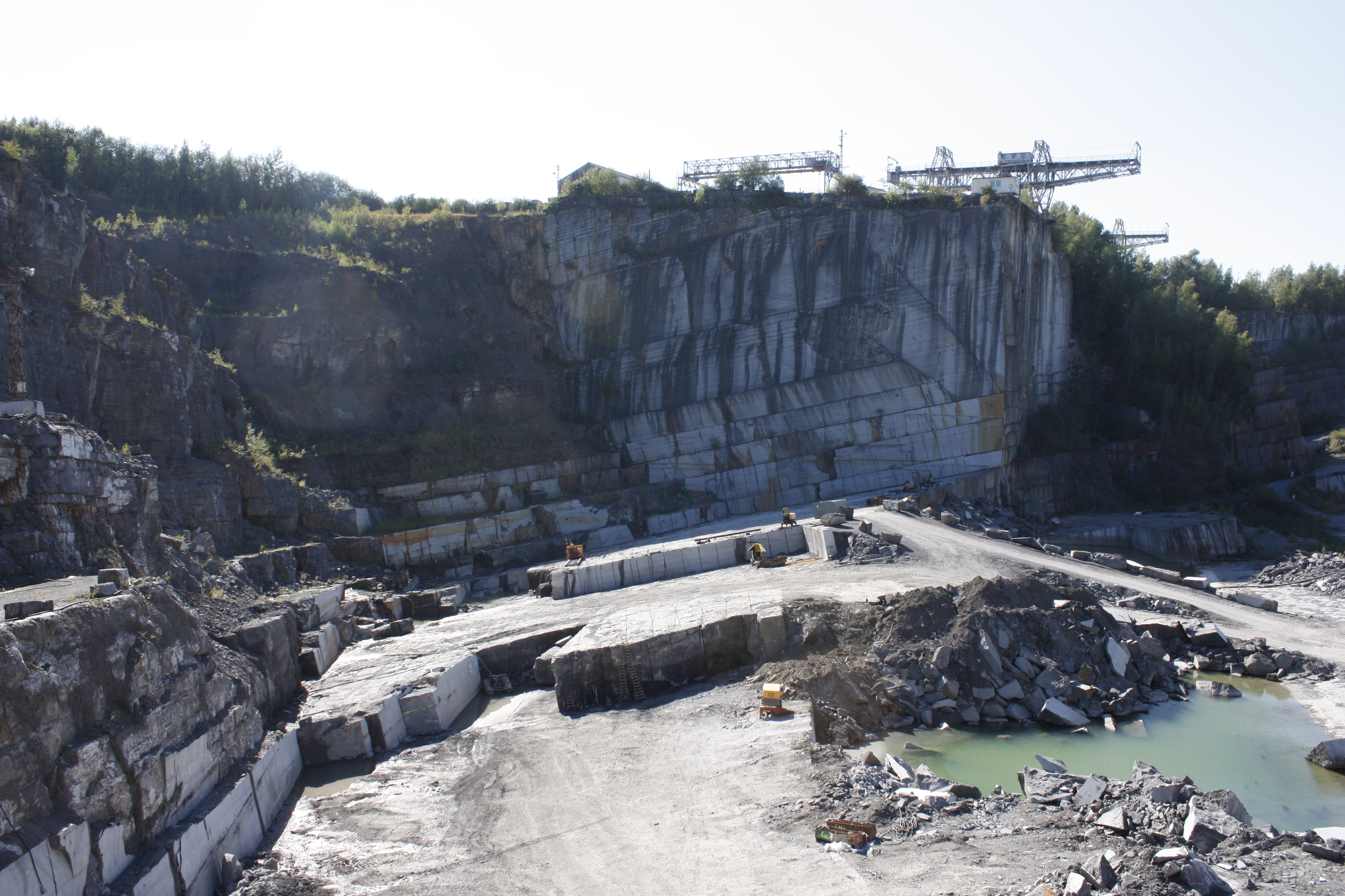 Grande Carrière ou carrière Gauthier-Wincqz : bureaux, ateliers, scierie, engins et outillage